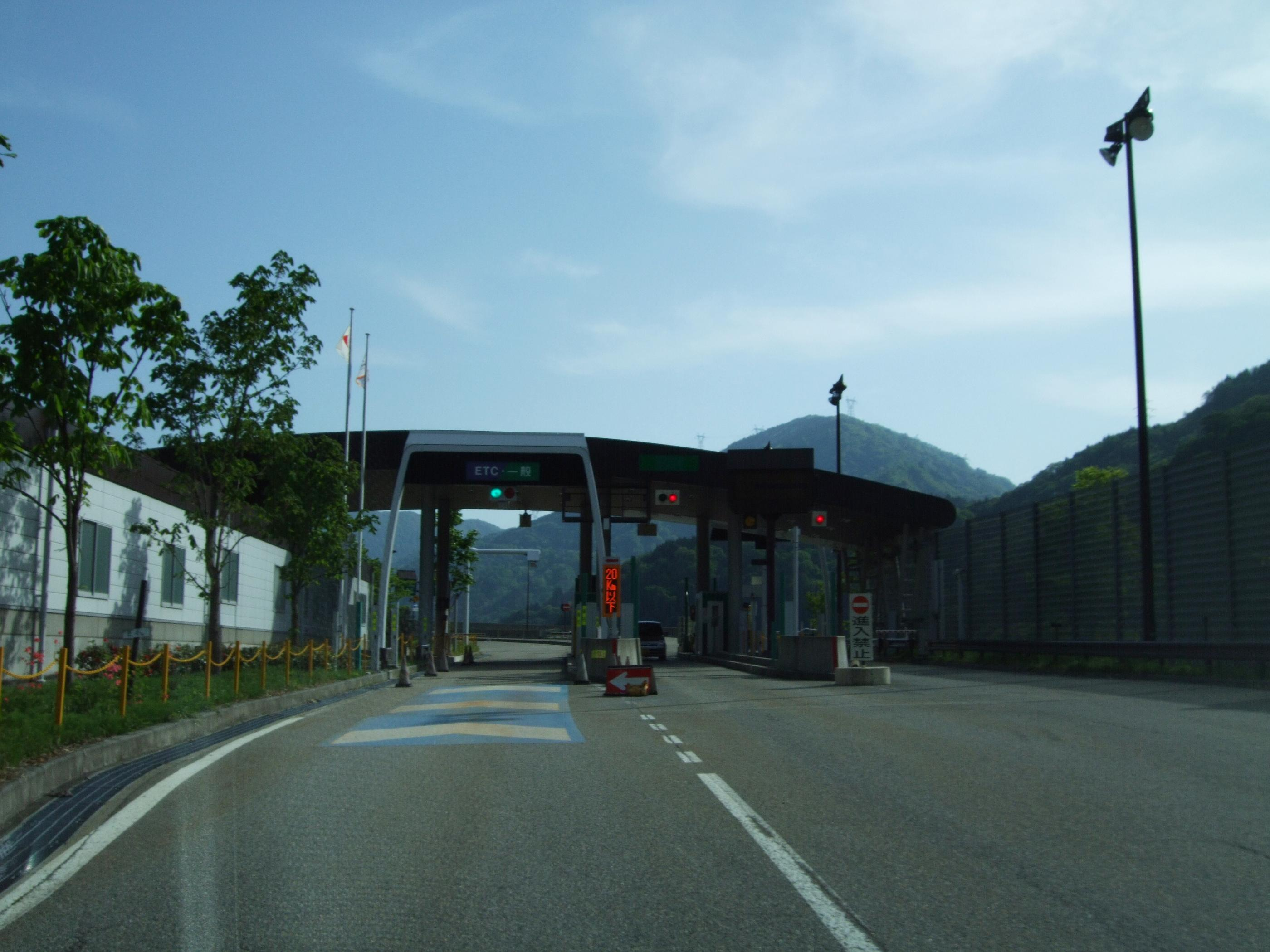 東海北陸自動車道 五箇山インターチェンジ （料金所入口） 2008.5.16 投稿者が撮影